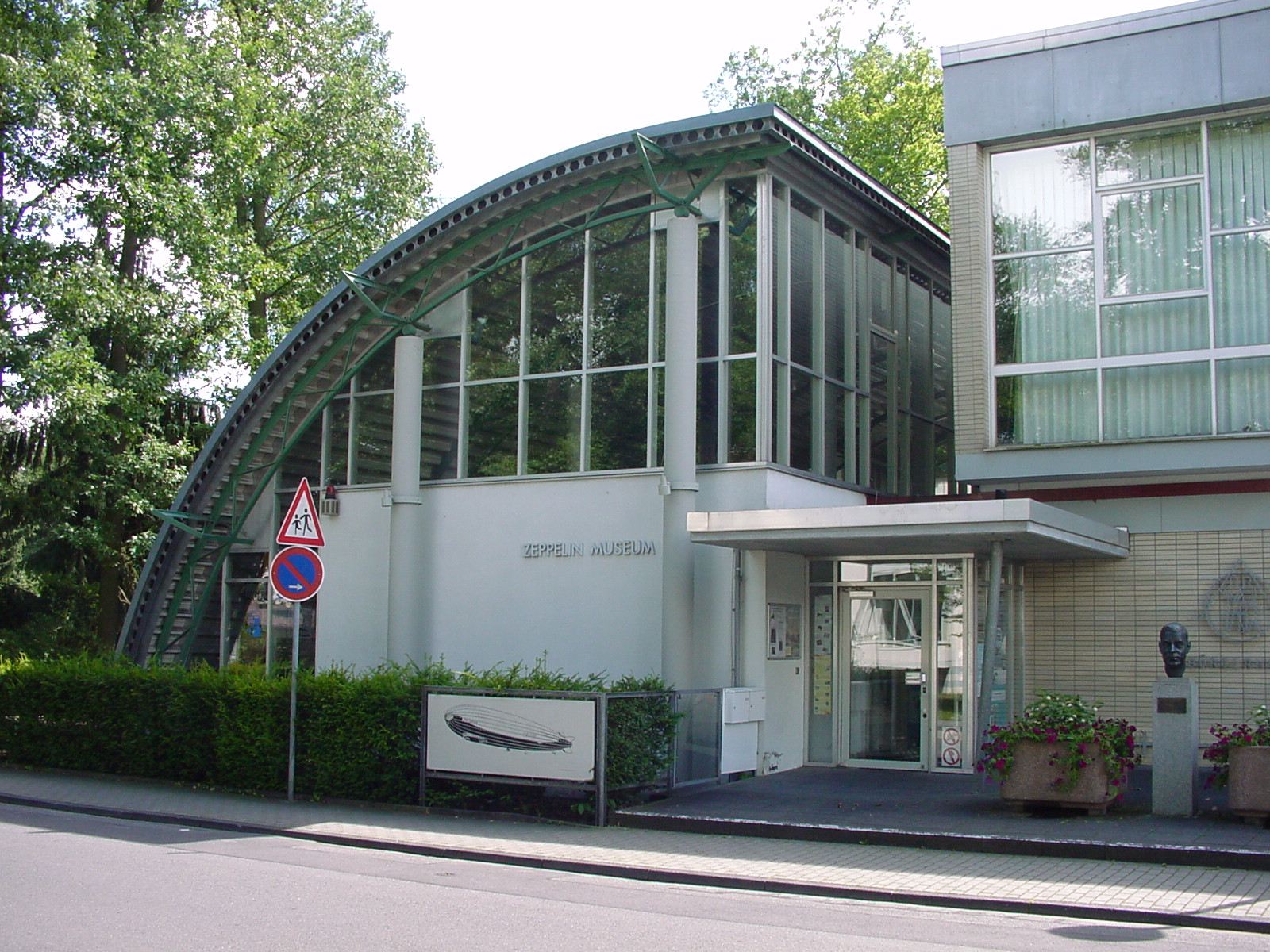 Zeppelin Museum Zeppelinheim near Frankfurt am Main.